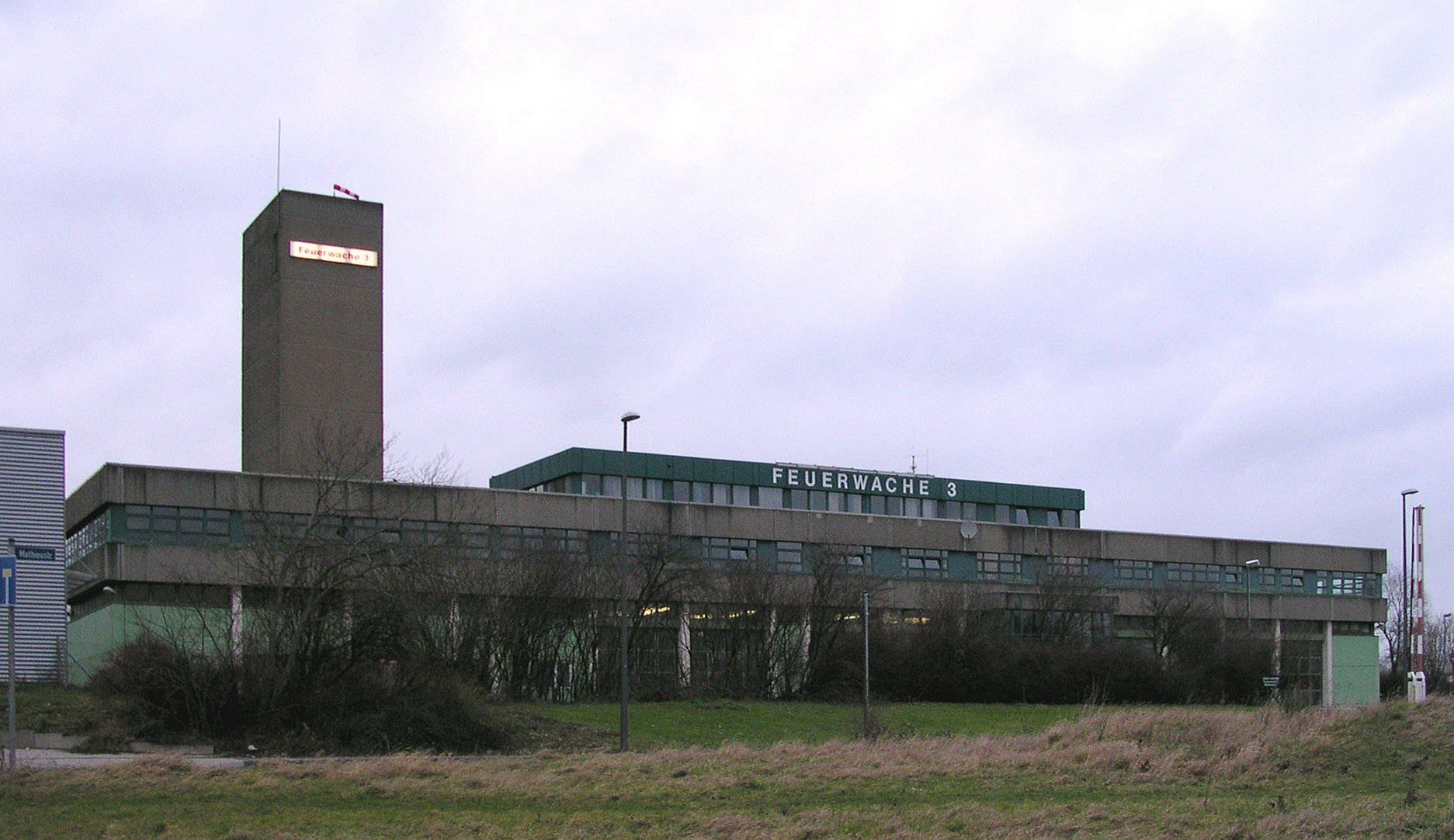 Aachen, Feuerwache 3